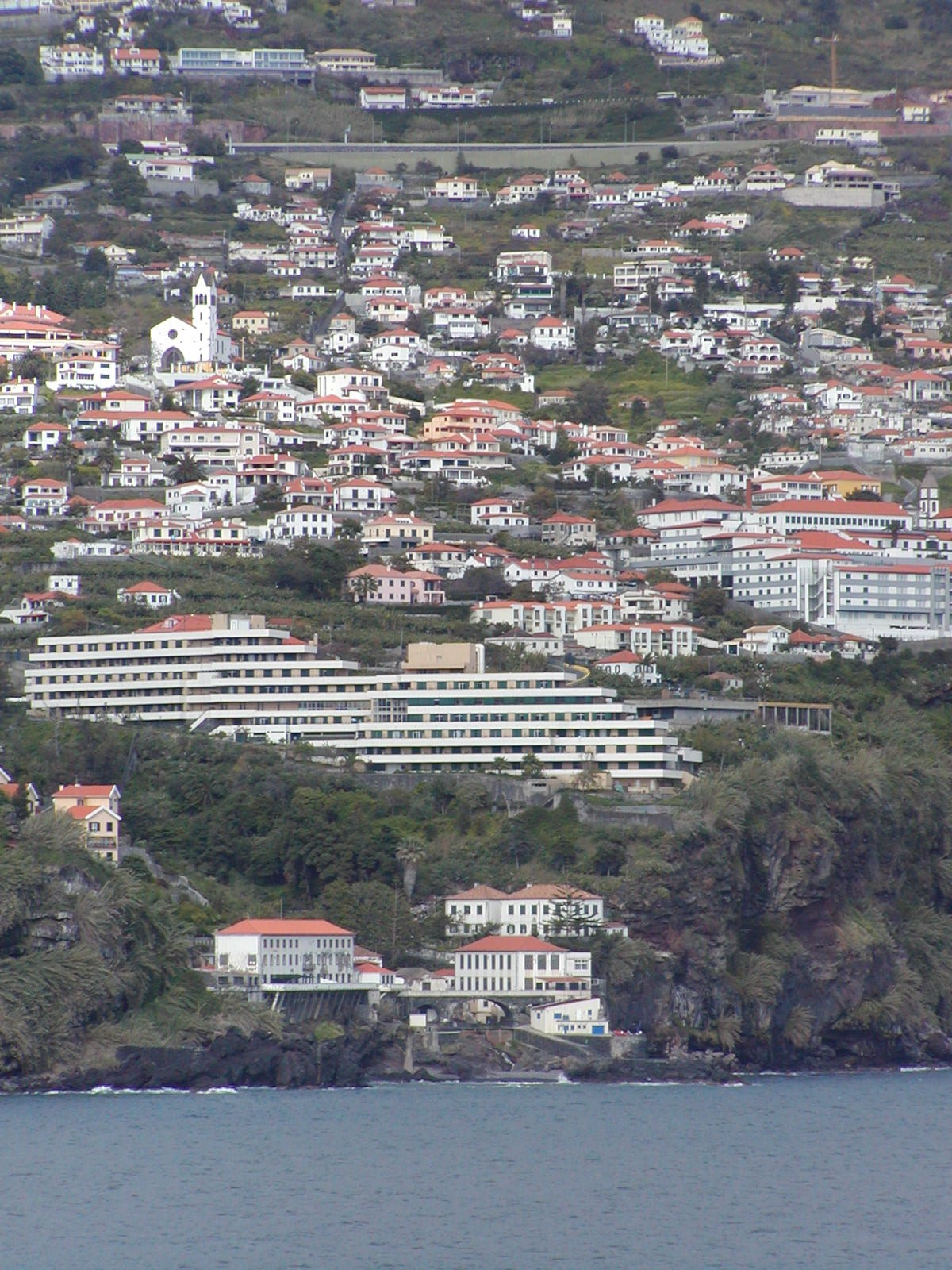 Blick auf São Gonçalo von Südwesten. Links auf 2/3 Höhe die Igreja de São Gonçalo